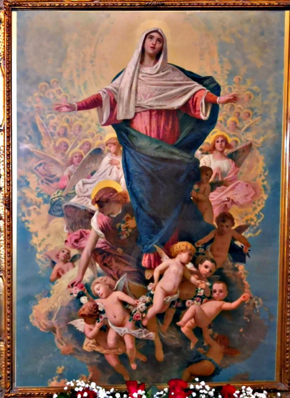 Antico quadro della Madonna Assunta, venerato sin dall' 800 in Nizza di Sicilia.